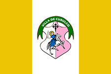 bandera cubulco